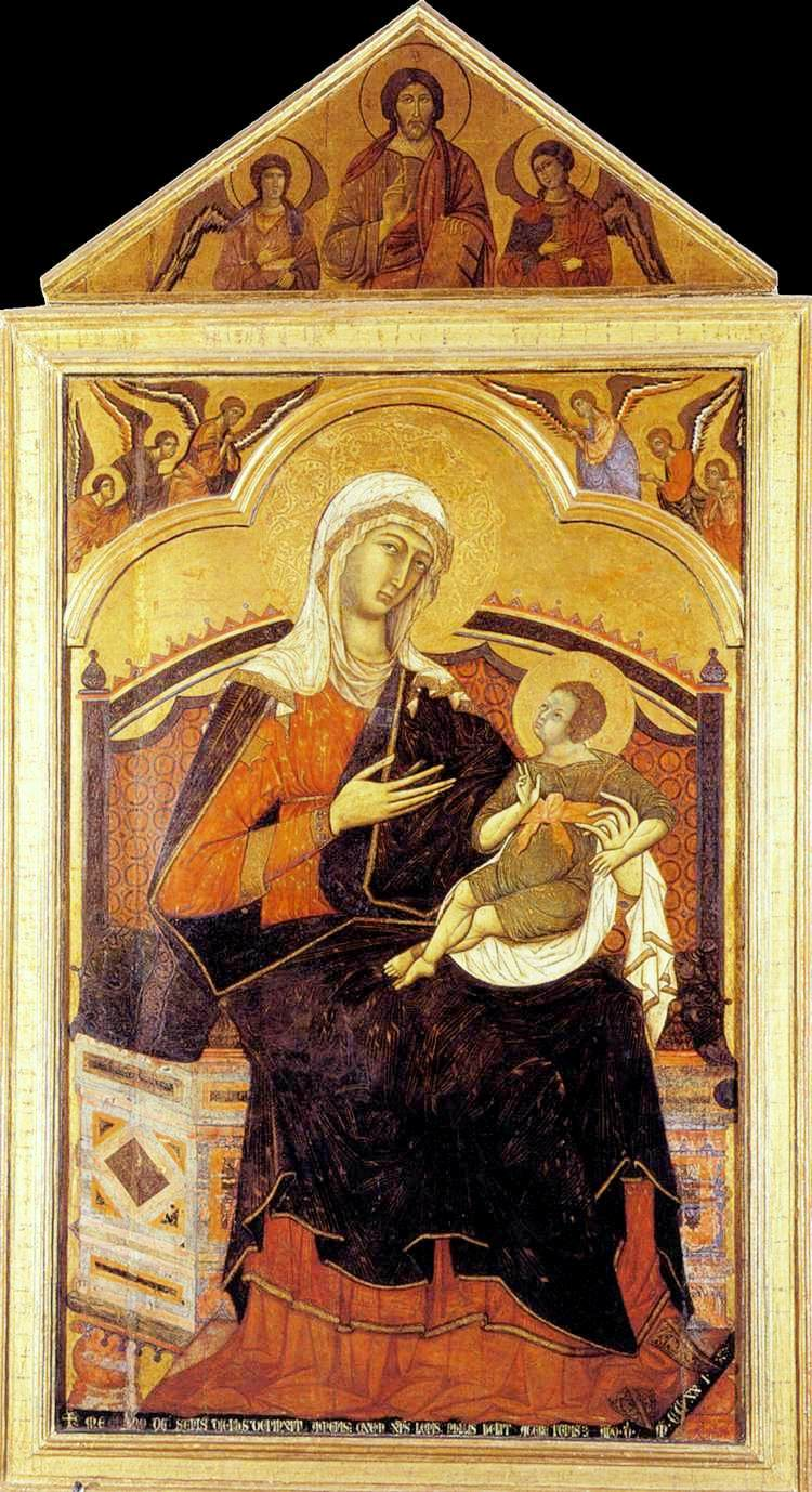 Madonna di Guido da Siena. Basilica di San Domenico (Siena).